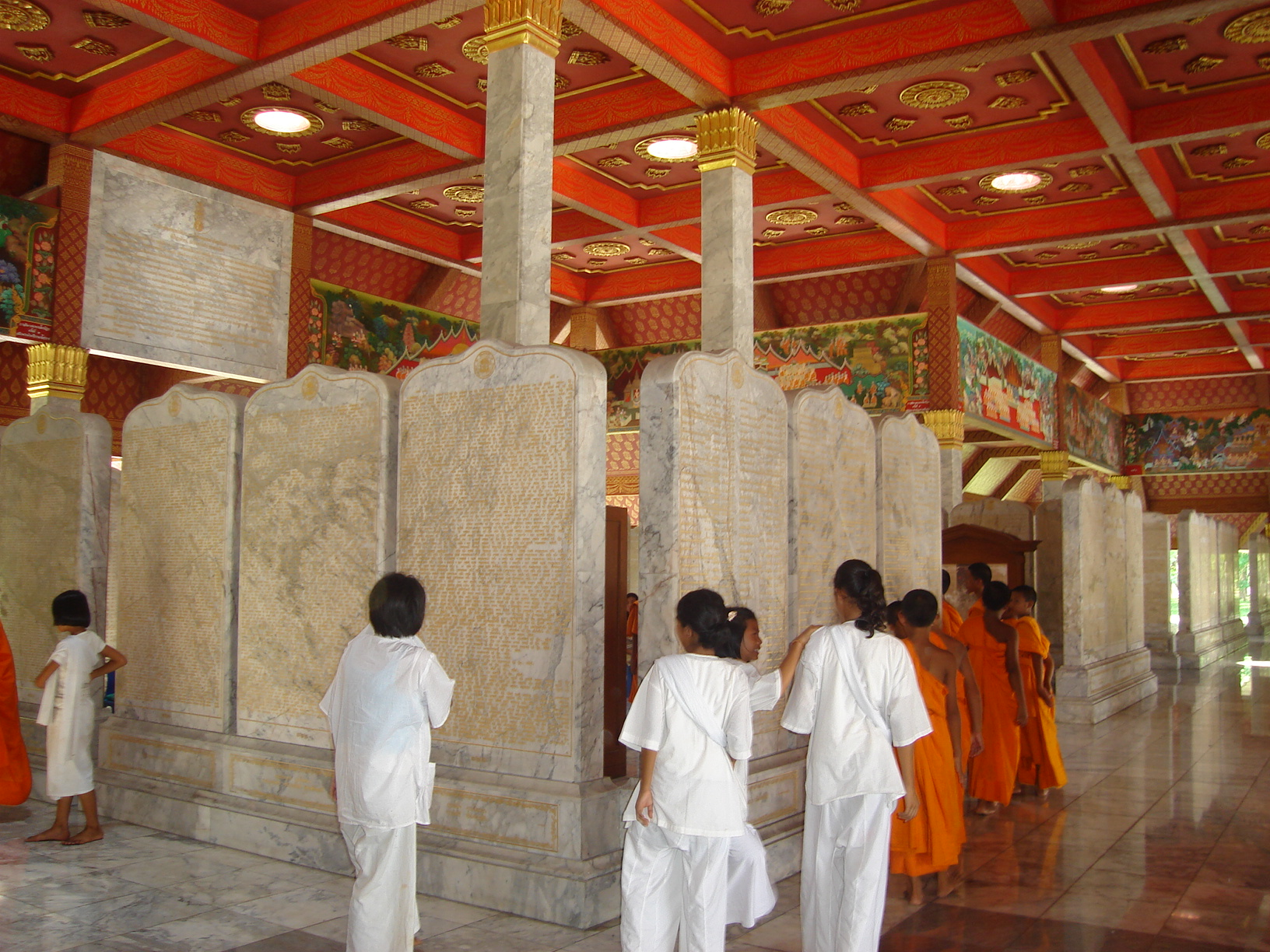 Buddhamondon